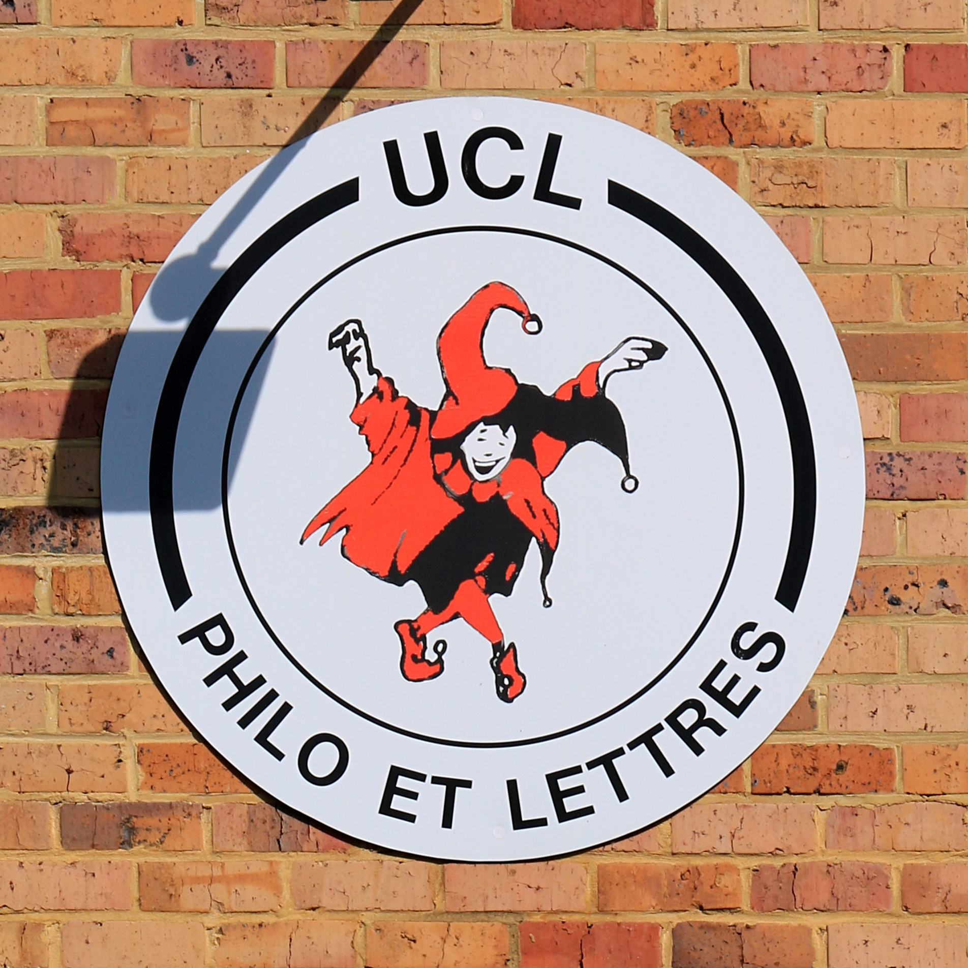 Belgique - Louvain-la-Neuve - Cercle de Philo et Lettres (voie Cardijn 6)